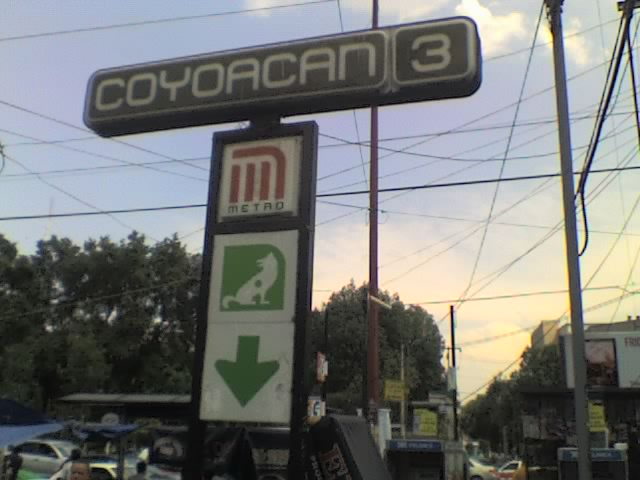 Letrero de la estación Coyoacán del Metro de la Ciudad de México